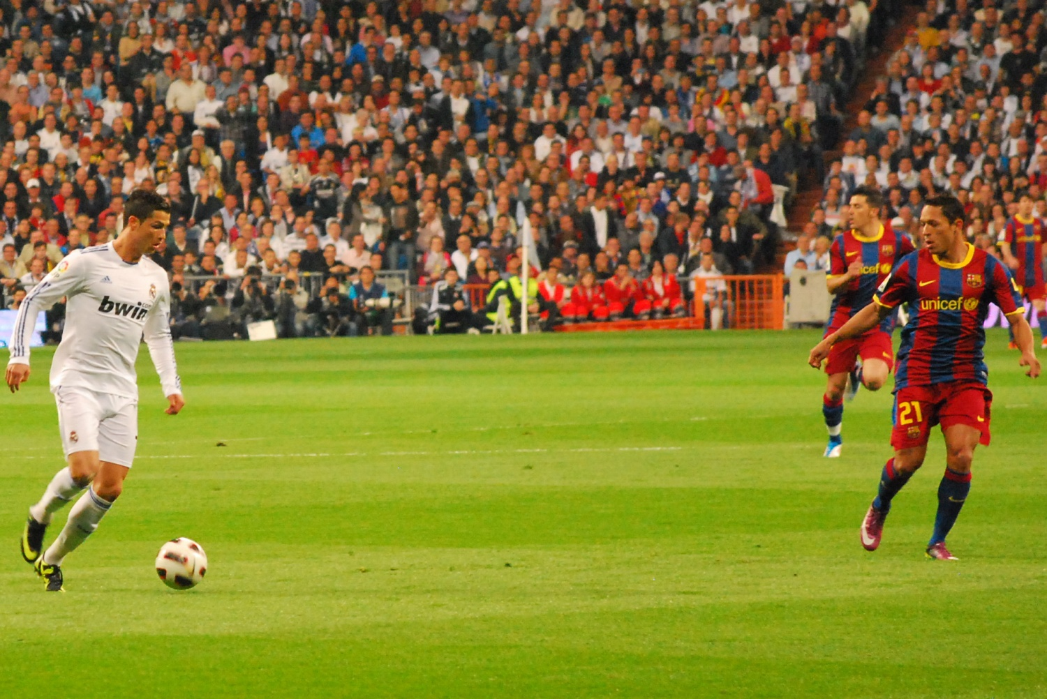 Cristiano Ronaldo